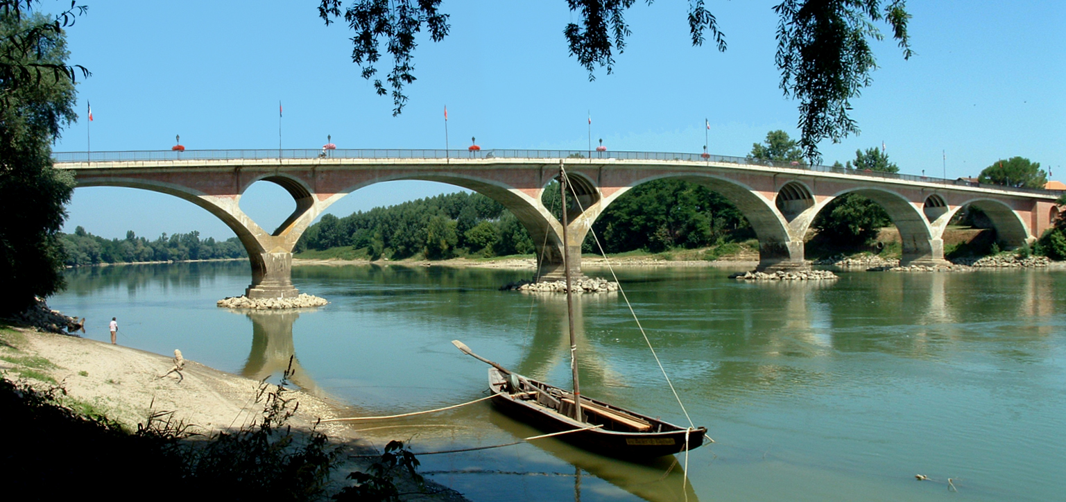 Pont de Tonneins sur la Garonne - Ensemble